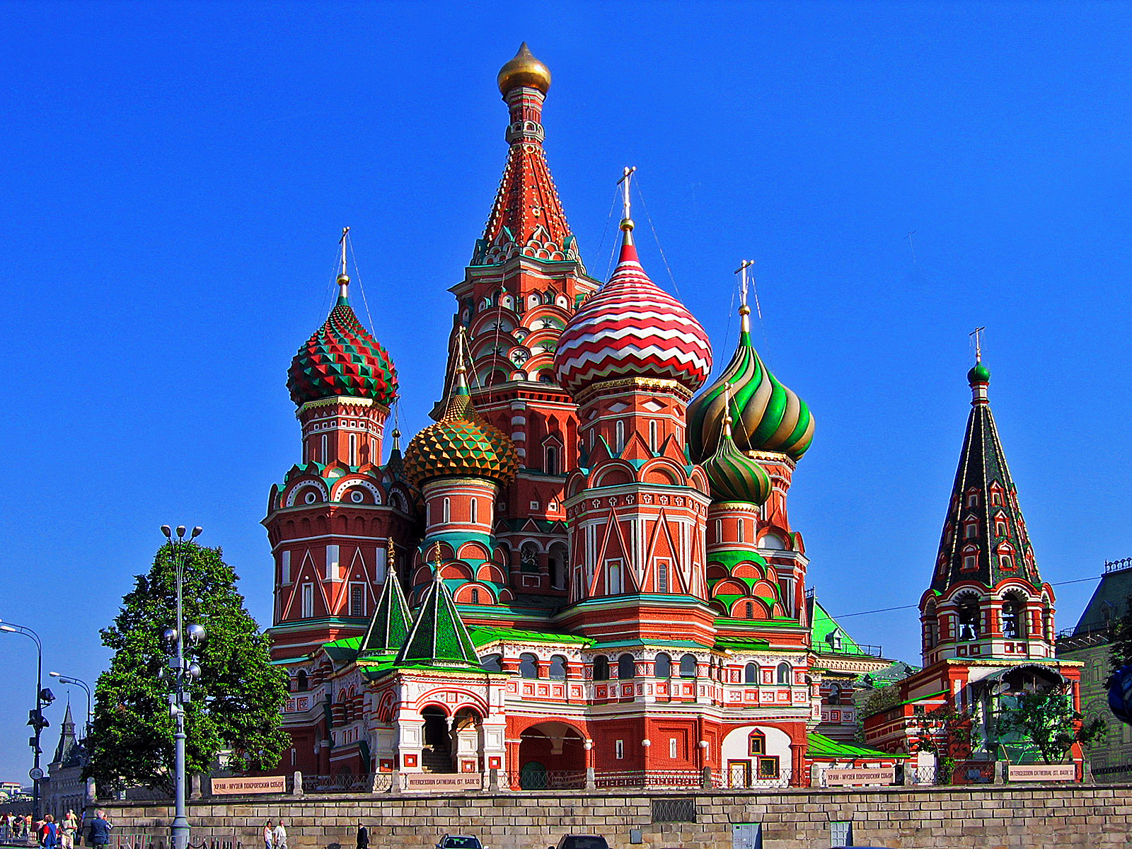 Foto di SANDRO E CRISTINA